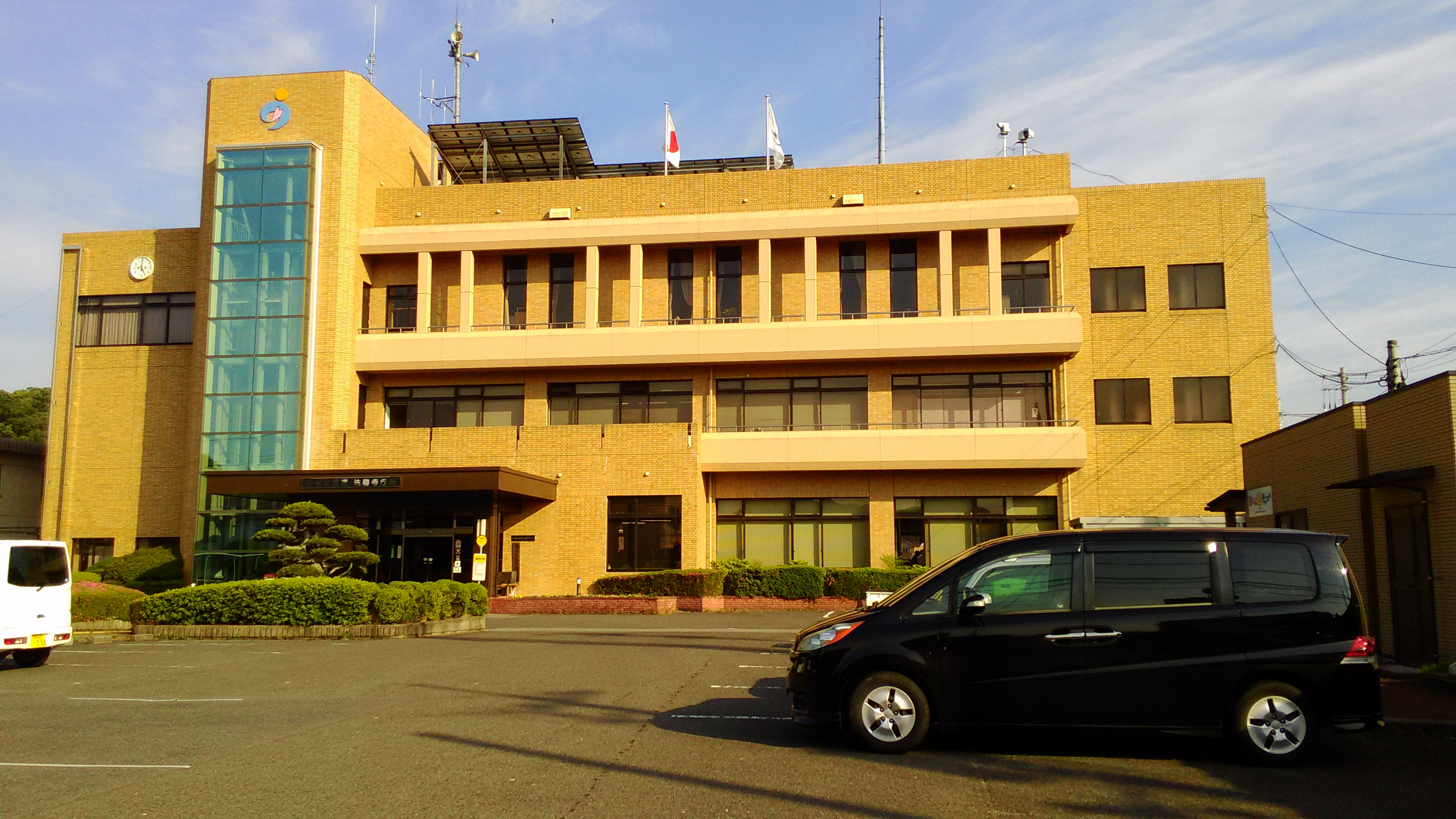 南部町役場